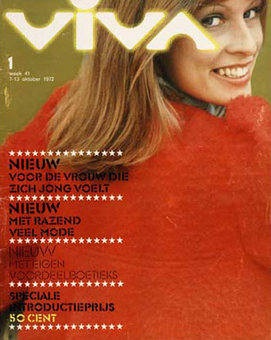 Eigendom van en geupload door Viva.